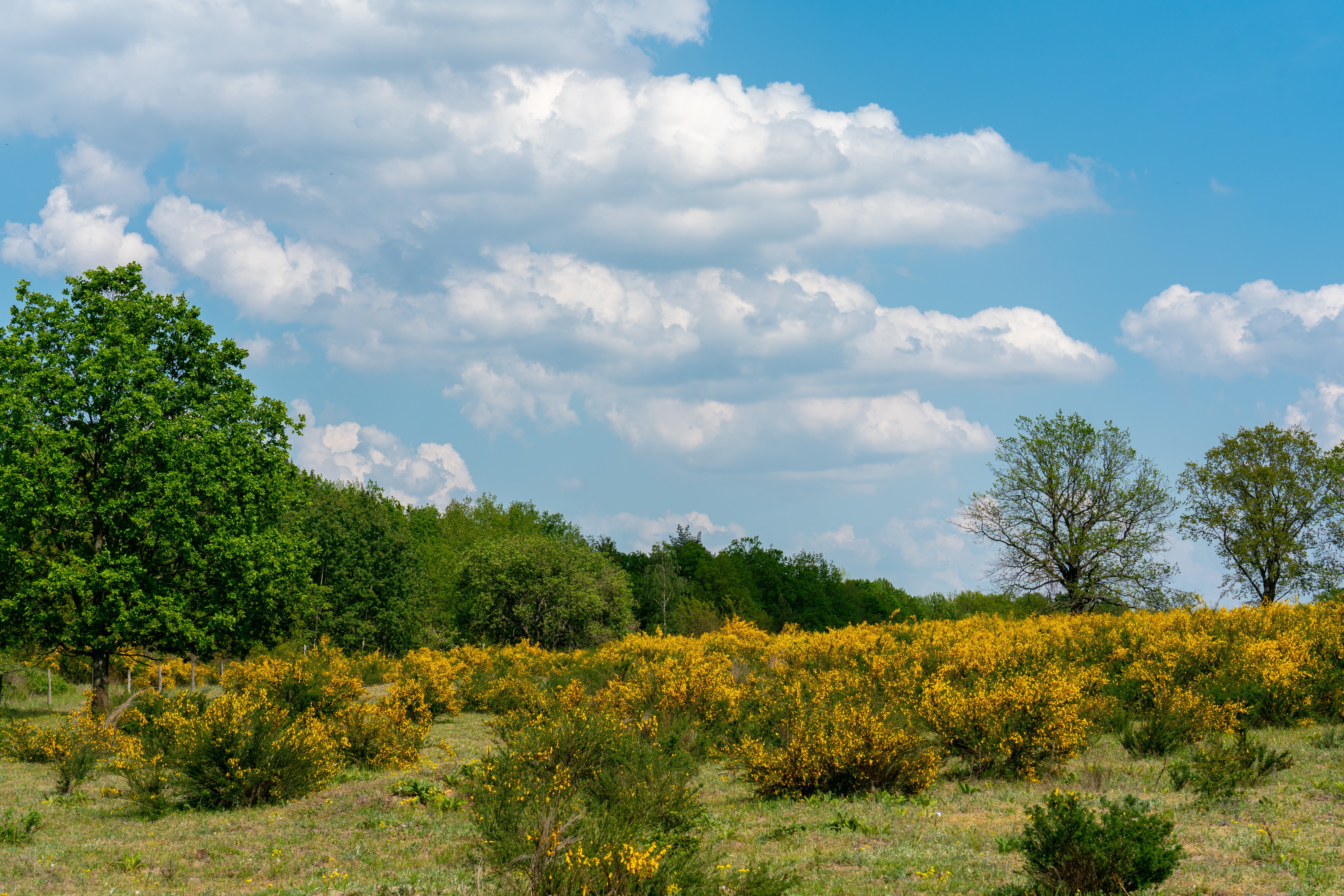 Ginsterblüte im Mai 2019 im Naturschutzgebiet Ferbitzer Bruch westlich von Berlin